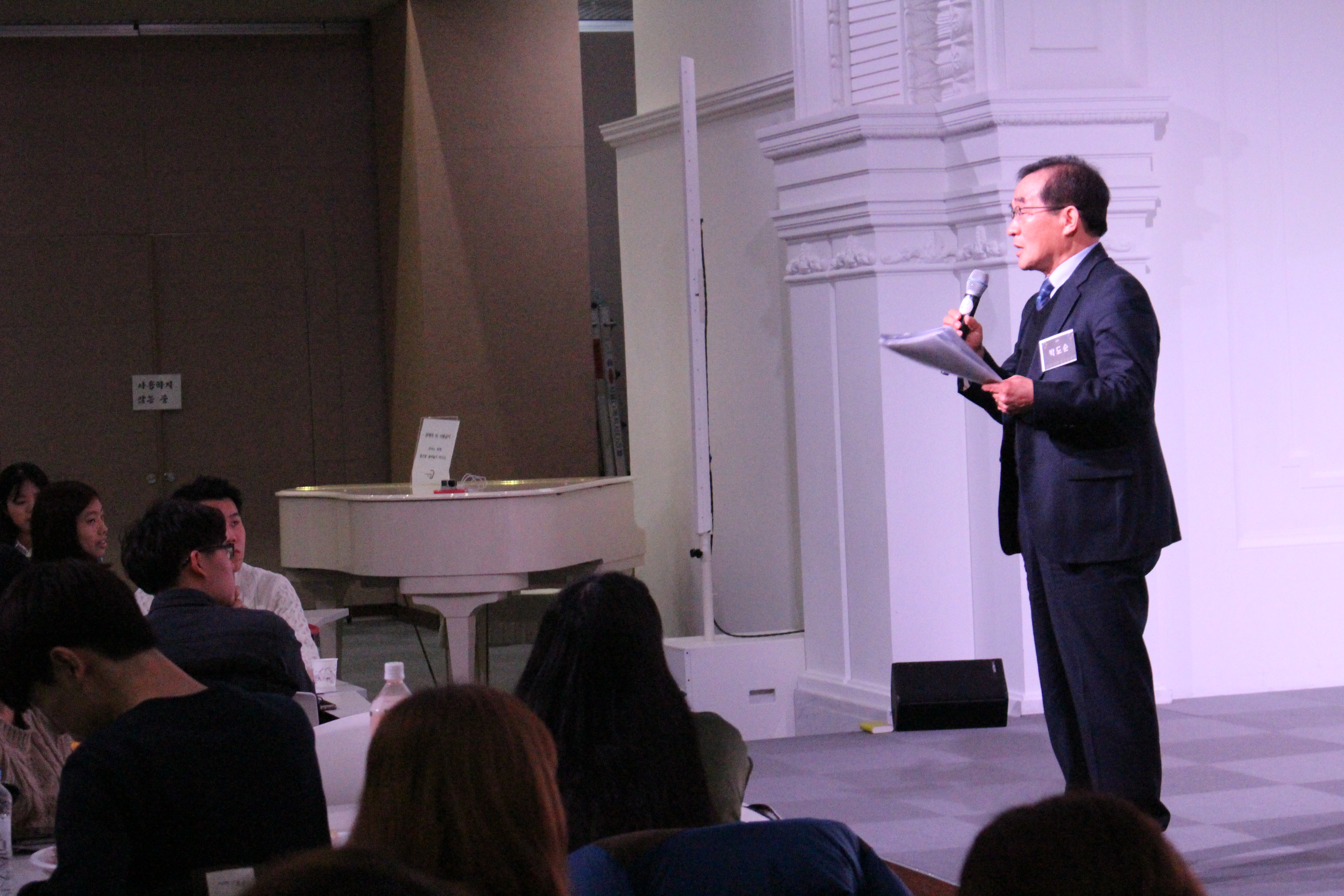 콘퍼런스 위기 2016 WINTER에서 박도순이 강연하고 있다.